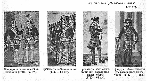 Эта картинка была использована для иллюстрирования статьи «Лейб-кампания» опубликованной в четырнадцатом томе «Военной энциклопедии», который был издан книгоиздательским товариществом И. Д. Сытина в 1914 году в столице Российской империи городе Санкт-Петербурге. Более подробное описание к этому рисунку можно прочесть в указанной выше статье на сайте Русской Викитеки.